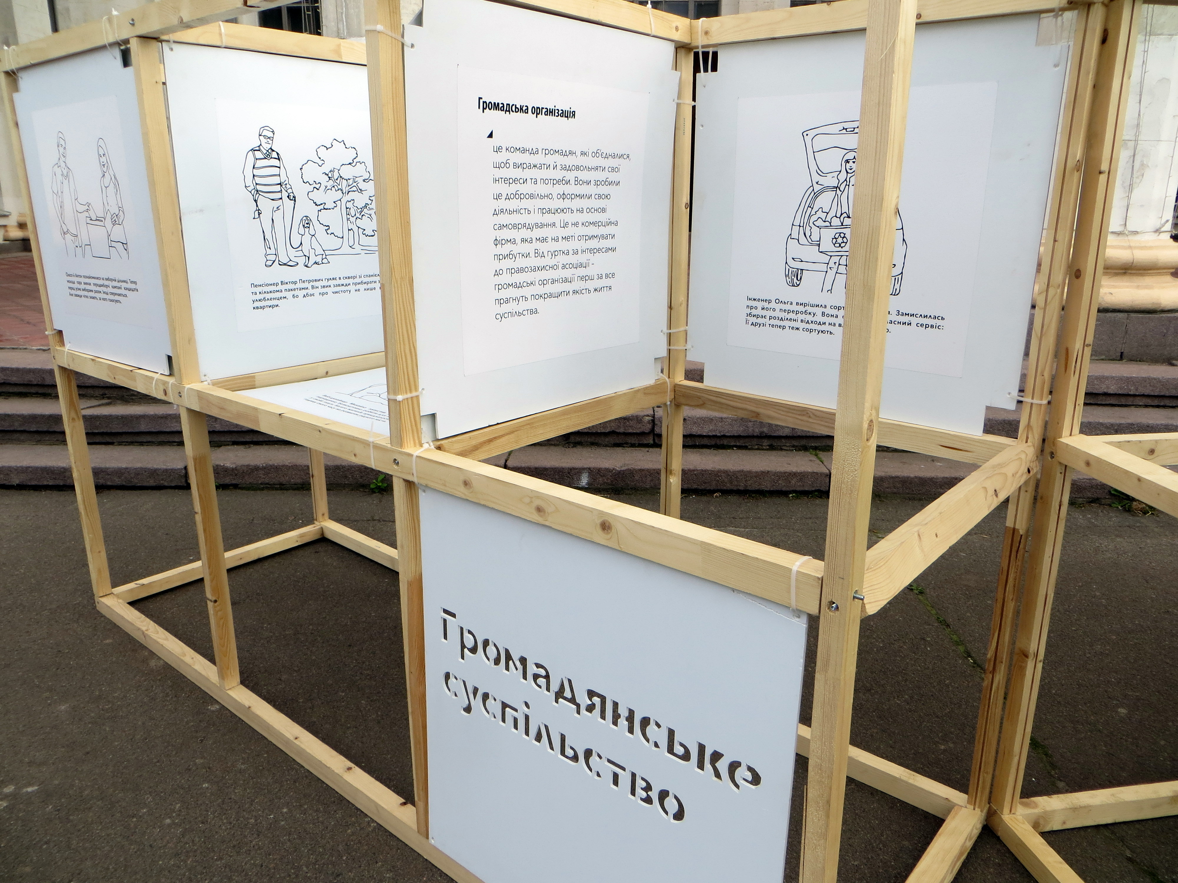 Четвертий фестиваль Atlas Weekend. Алея ГО